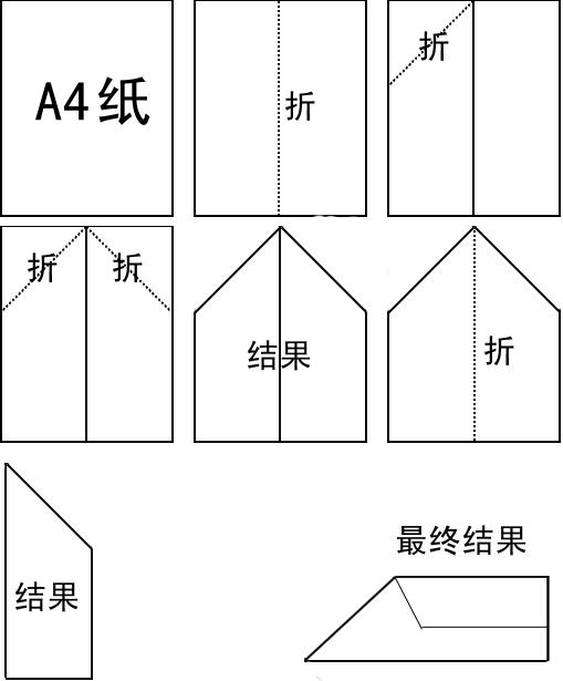 本人制作，根据en wiki重新绘制